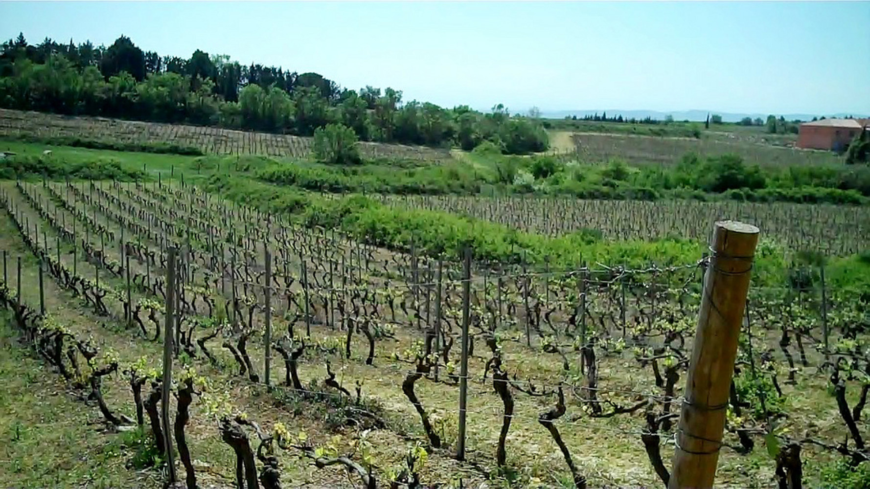 Parcelle de syrah en Cabardès